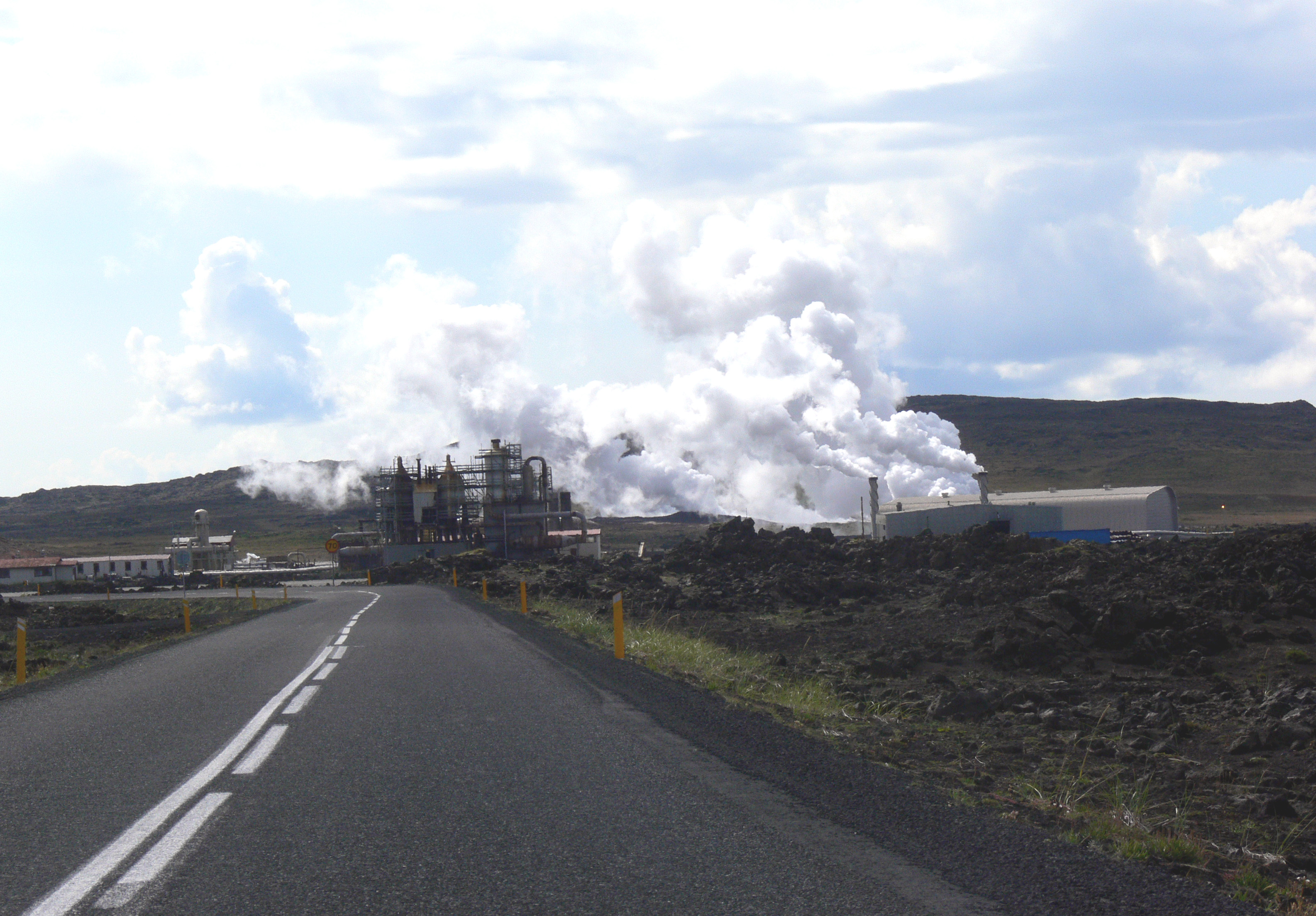 Thermalgebiet Gunnuhver auf Reykjanes.